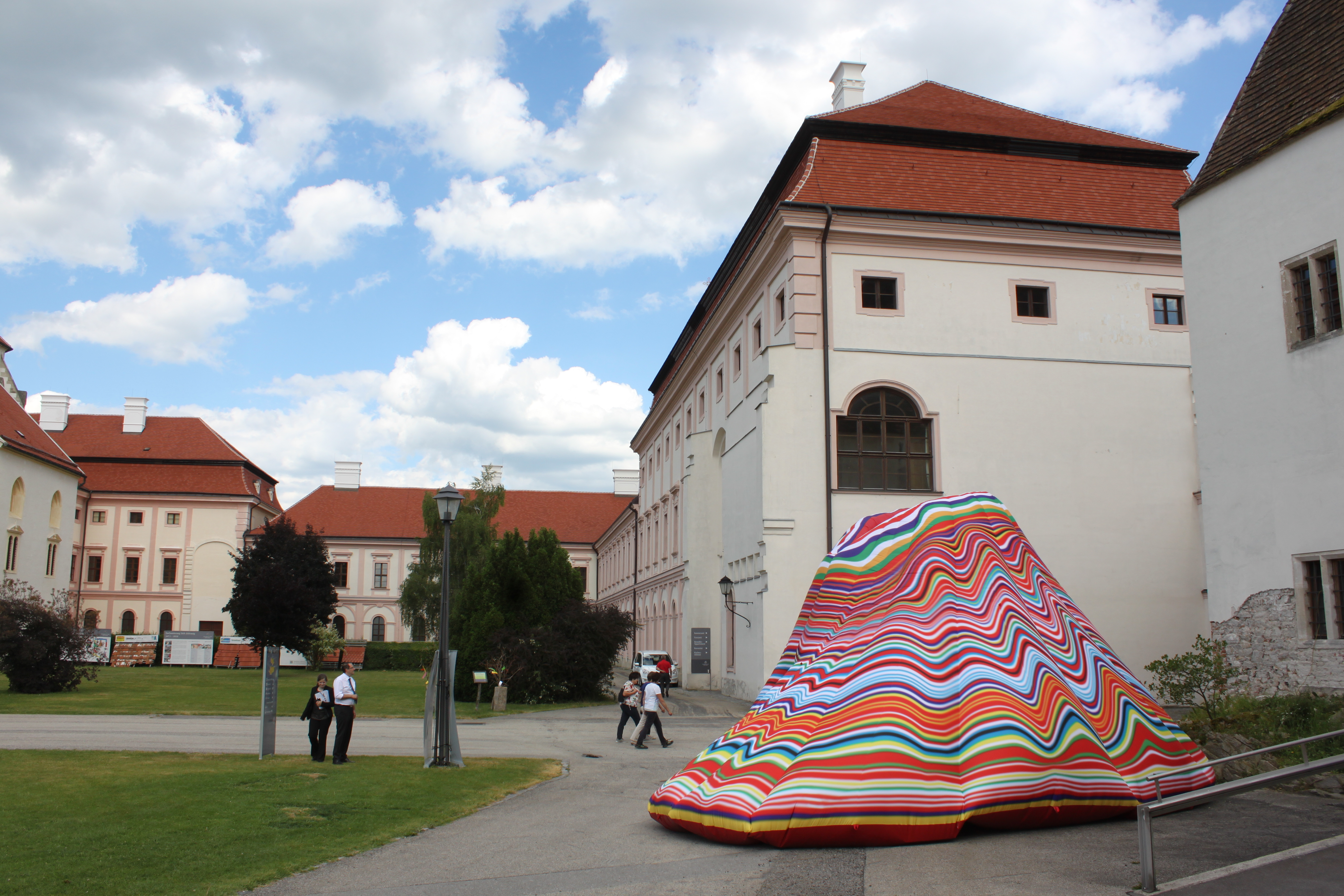 Vulkan Amikejo vor der alten Burg im Stift Göttweig, Blick im offenen Hof des Stiftes